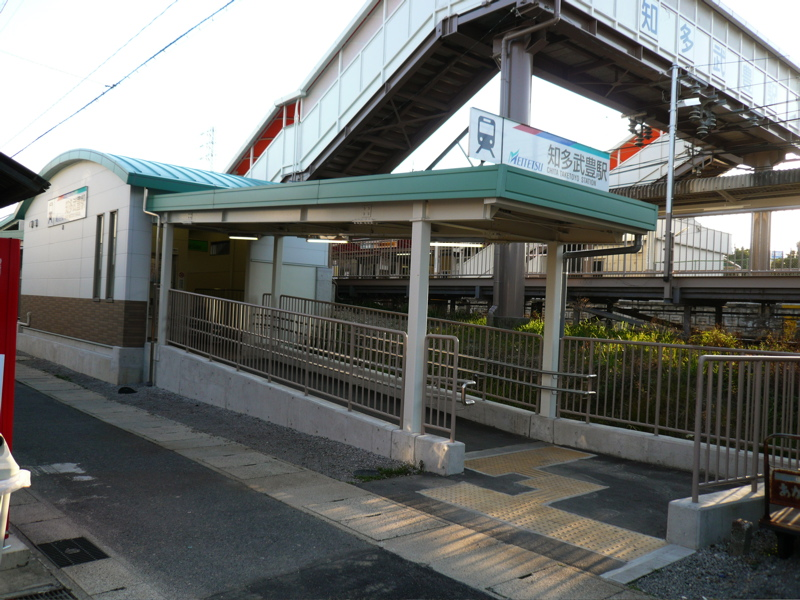 名鉄知多武豊駅の東口駅舎。